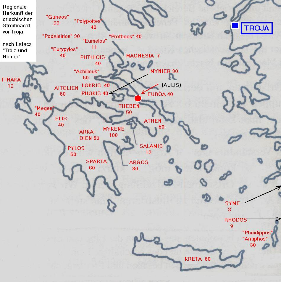 Herkunft griechischer Truppen vor Troja